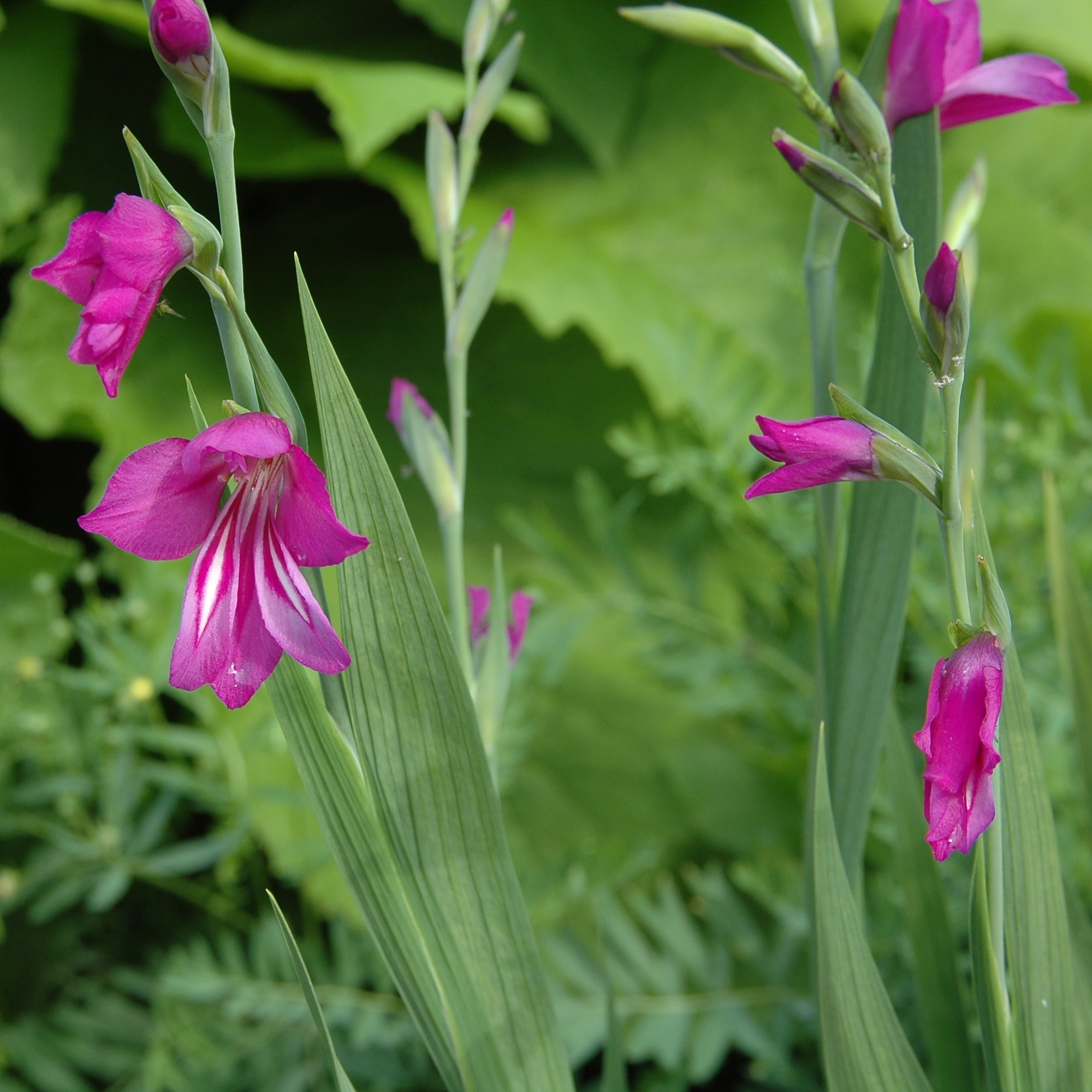 Gladiolus imbricatus in Västerås Botanical garden